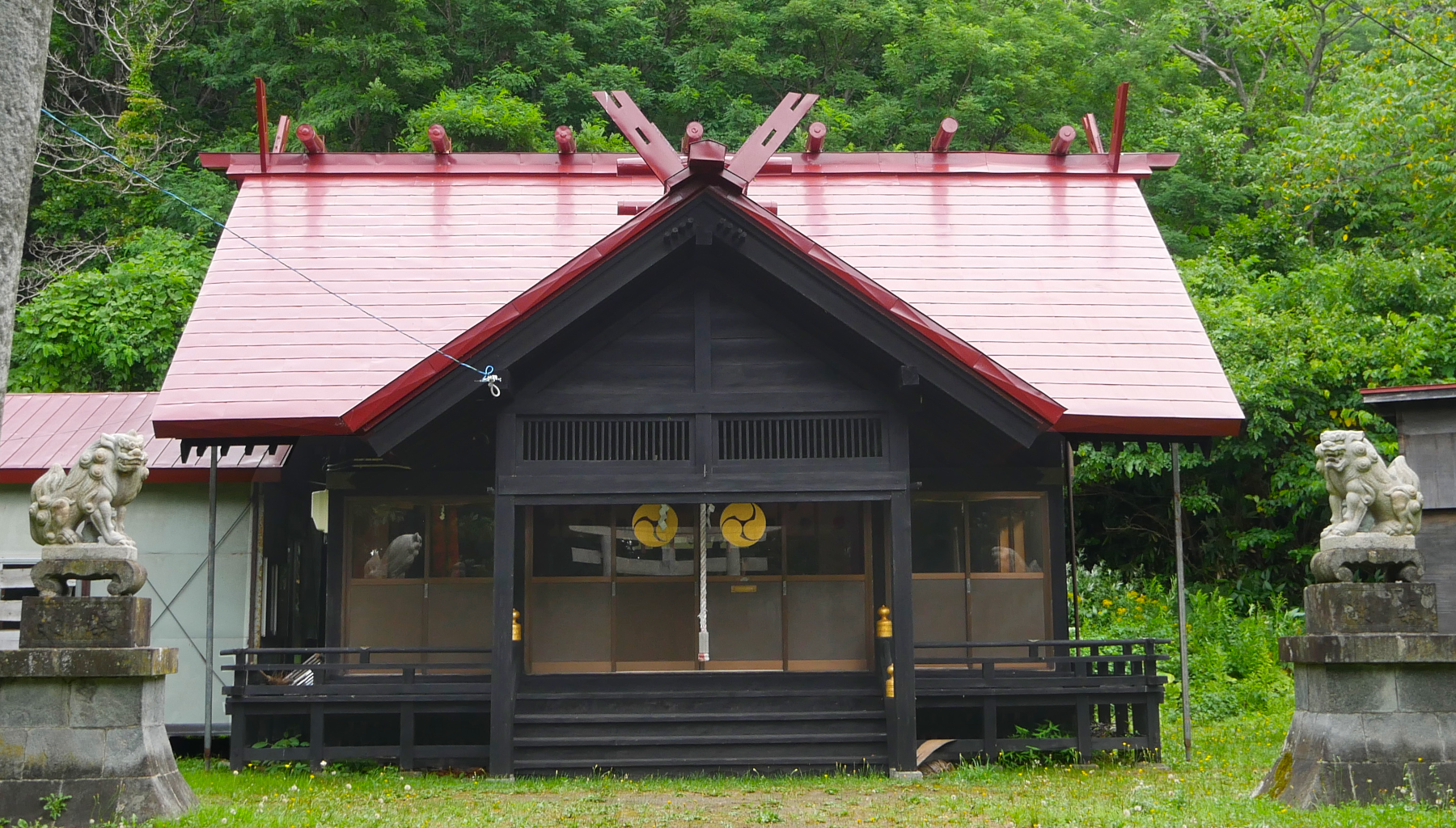 日本北海道石狩市浜益区にある神社です。